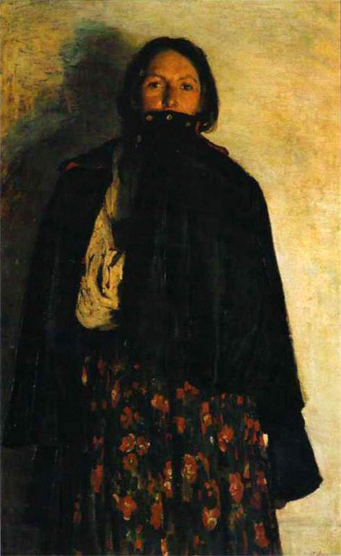 Крестьянка, закрывающая свиткой рот, 1894 г